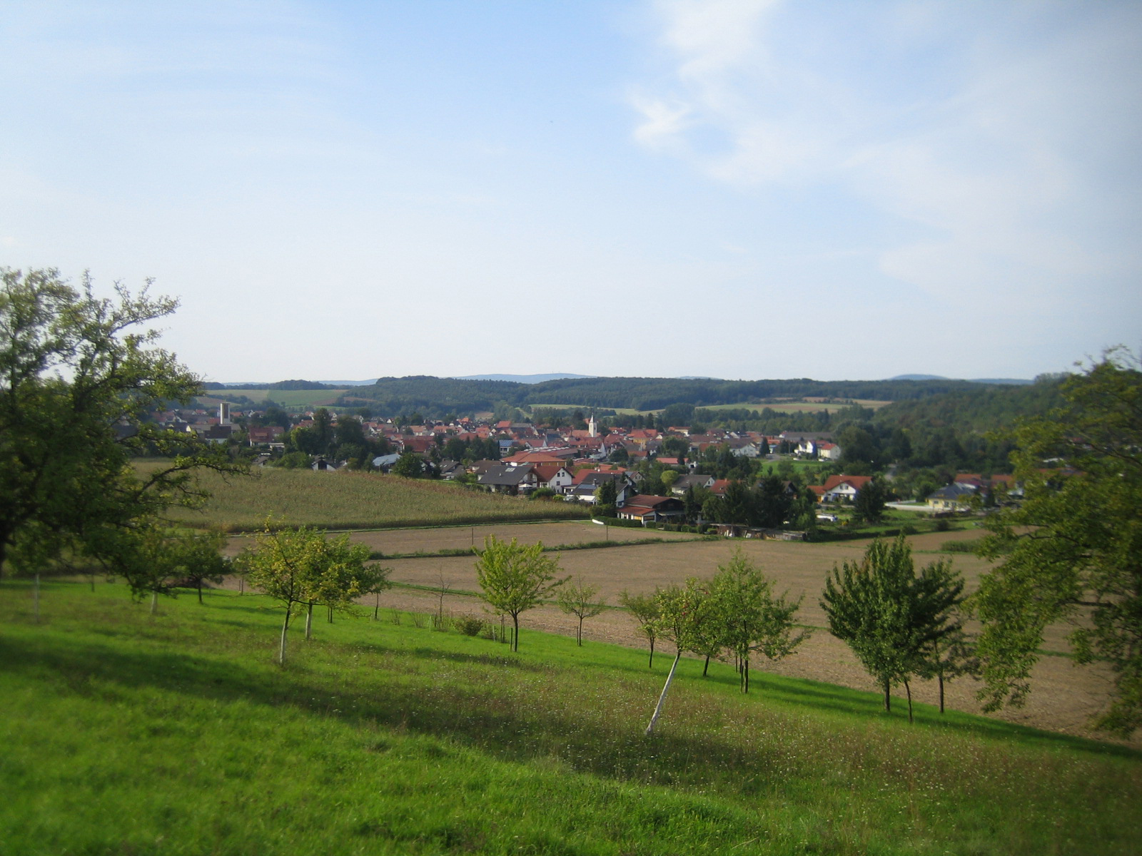 Eschelbronn Panorama